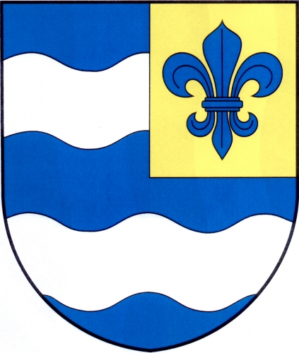 znak, Dolní Libochová, okres Žďár nad Sázavou